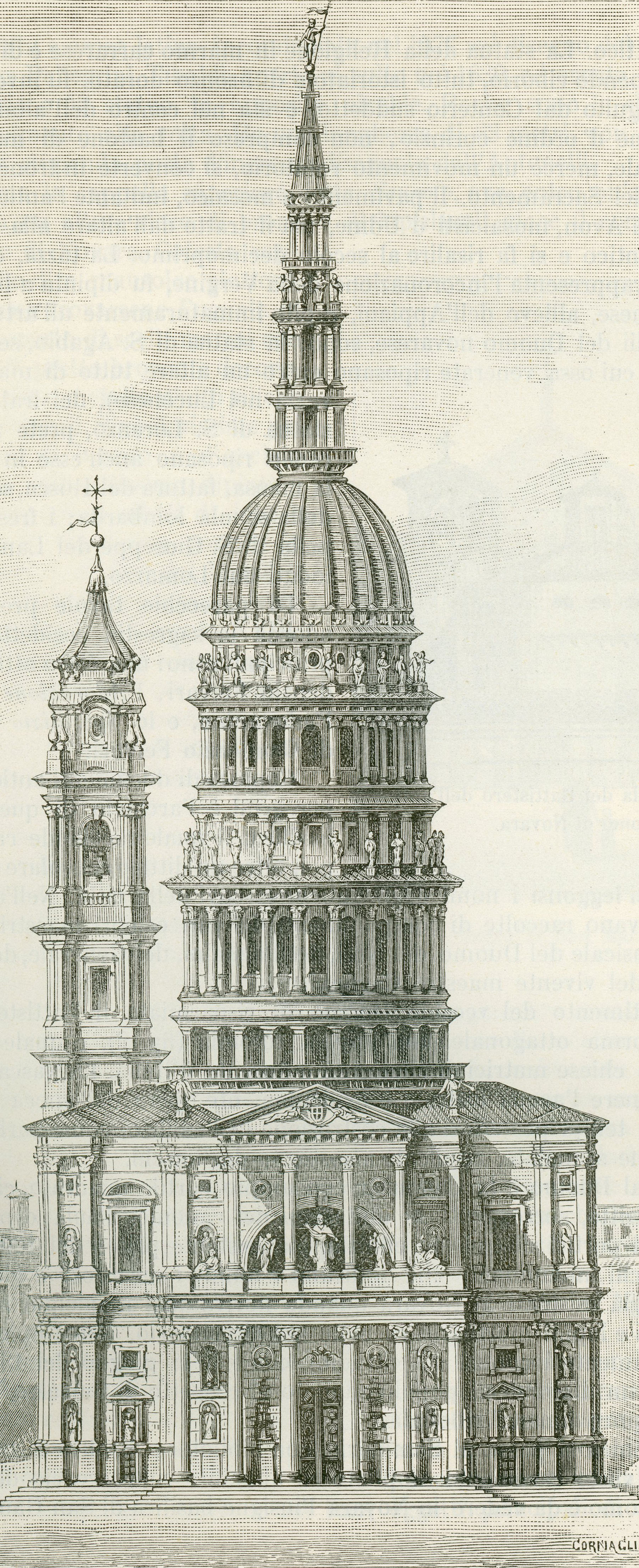 Basilica e cupola di San Gaudenzio in Novara, (xilografia di Barberis su disegno di Cornaglia)